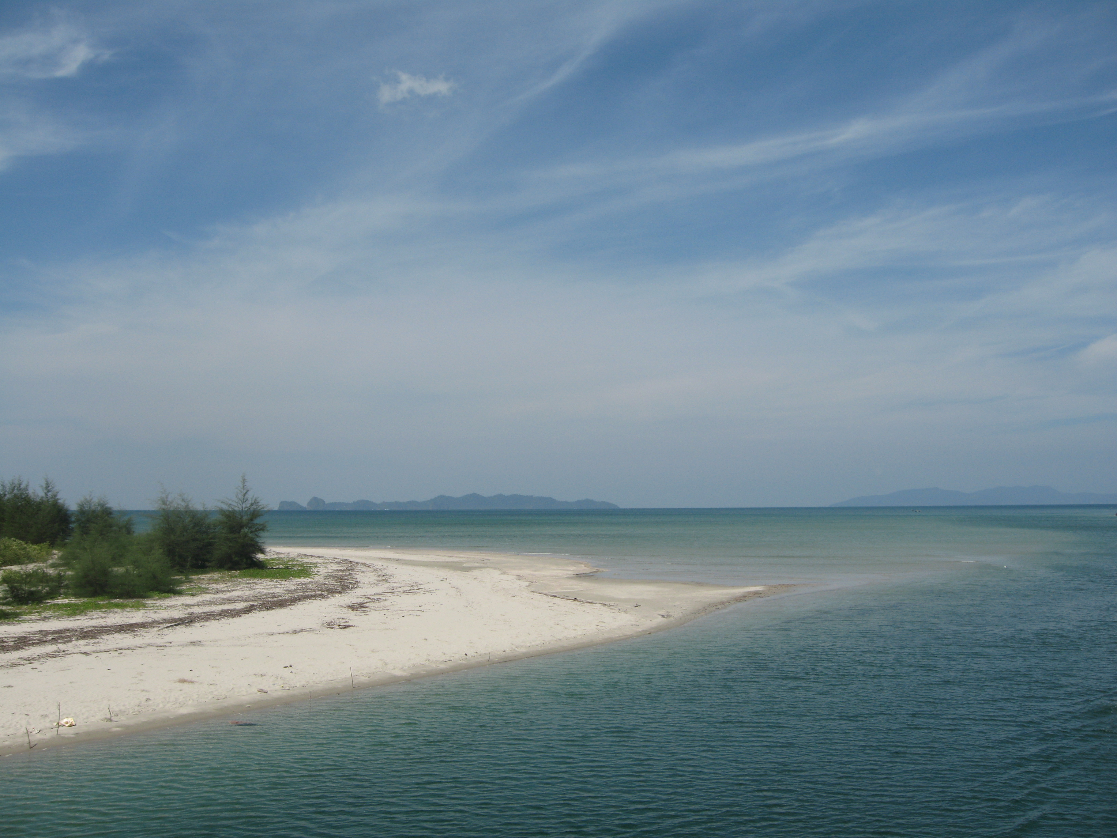 ปากคลองฉางหลาง